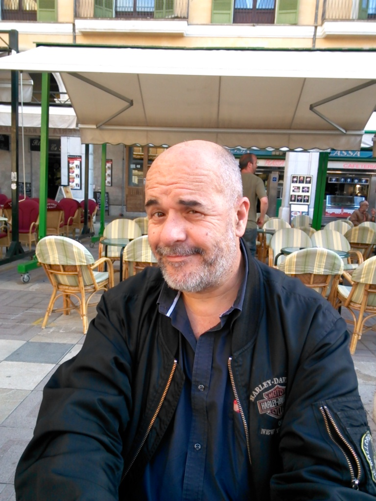 Rafel Vaquer a la plaça Major de Palma. Sant Jordi 2014